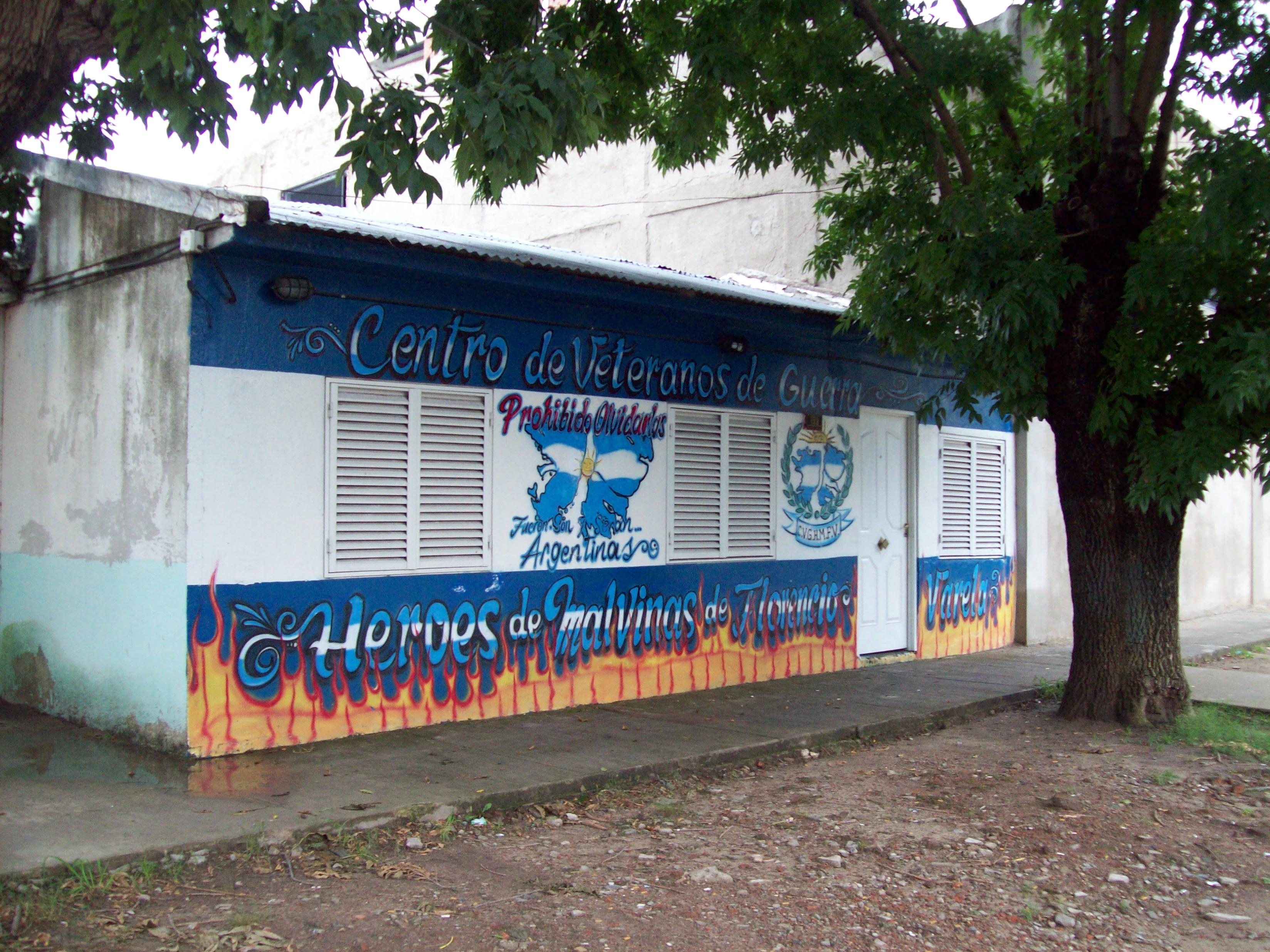 Centro de veteranos de la Guerra de Malvinas, en Florencio Varela.